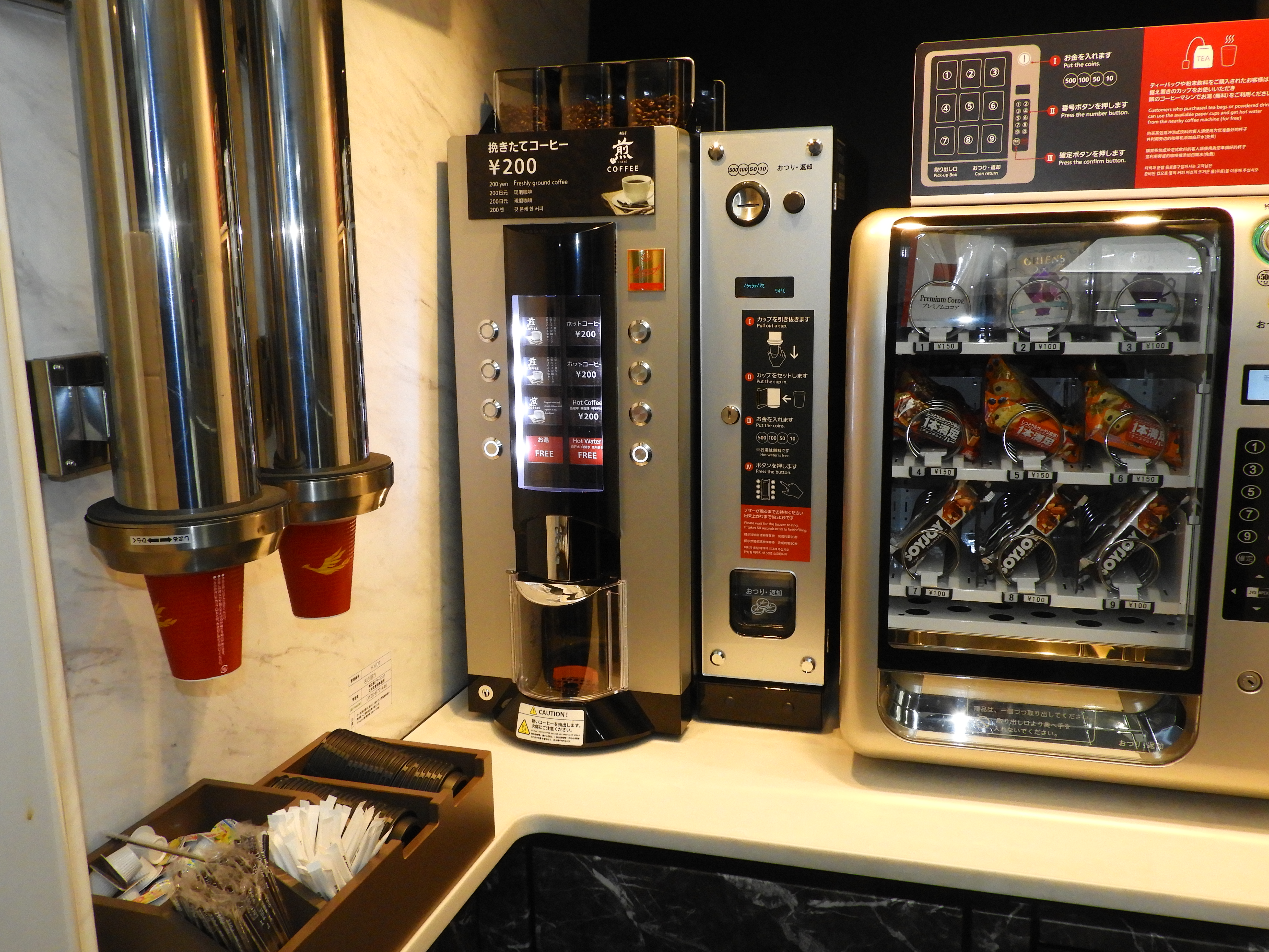 近鉄80000系の車内に設置されているカフェスポット